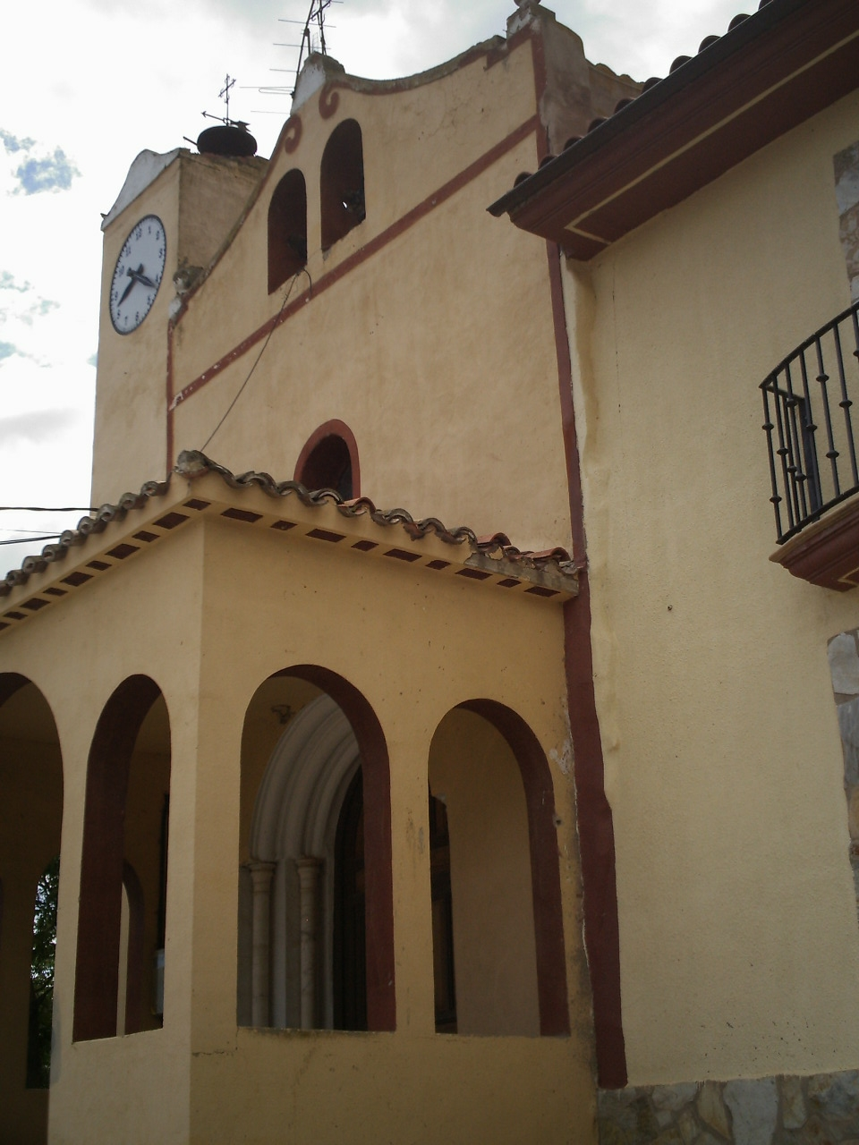 Las Ventas, La Rioja (España)